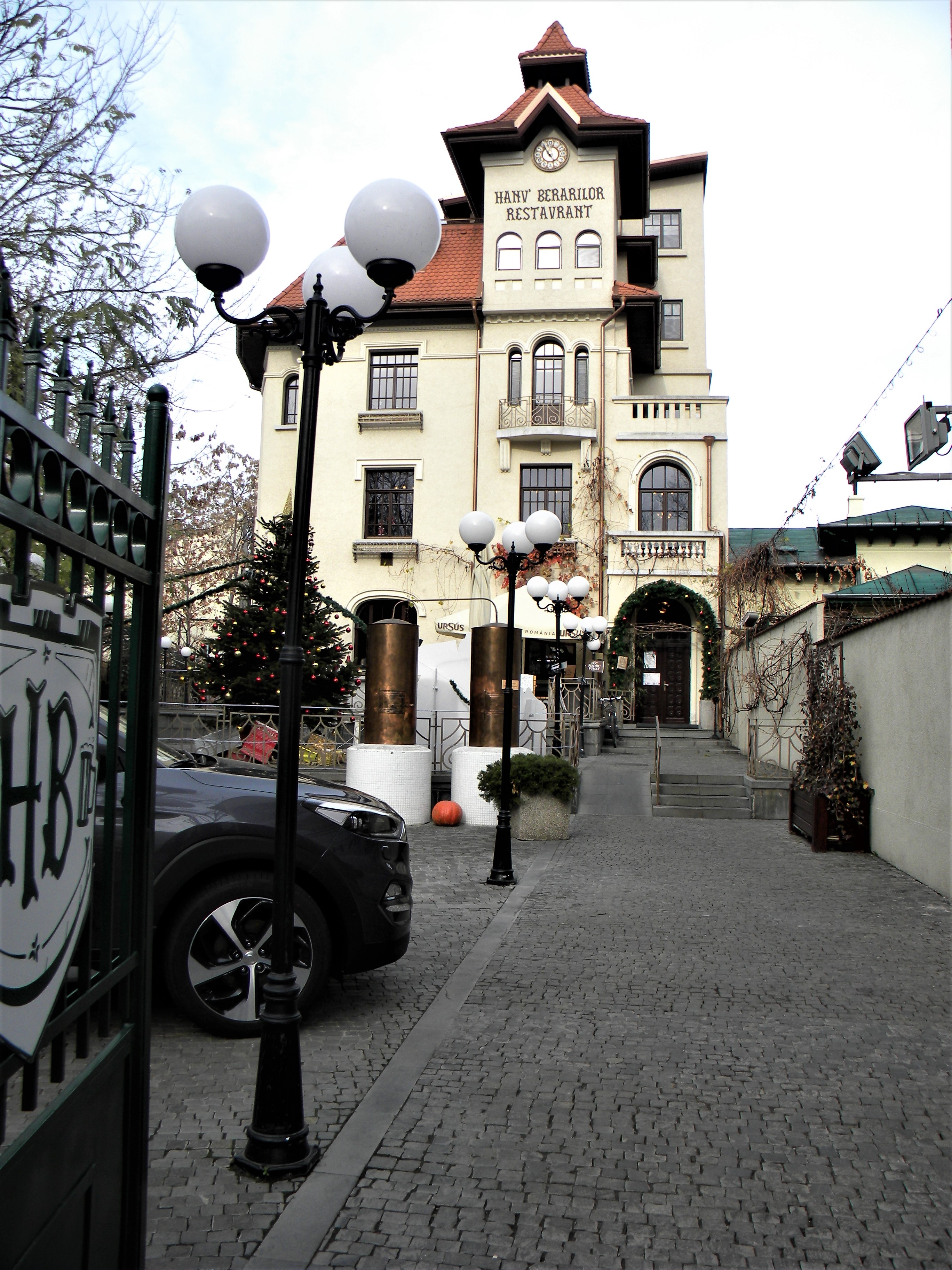 Bucuresti, Romania. RESTAURANTUL HANUL BERARILOR. Bd. Pache Protopopescu (B-II-m-B-19483). Una din casele Elenei Lupescu.